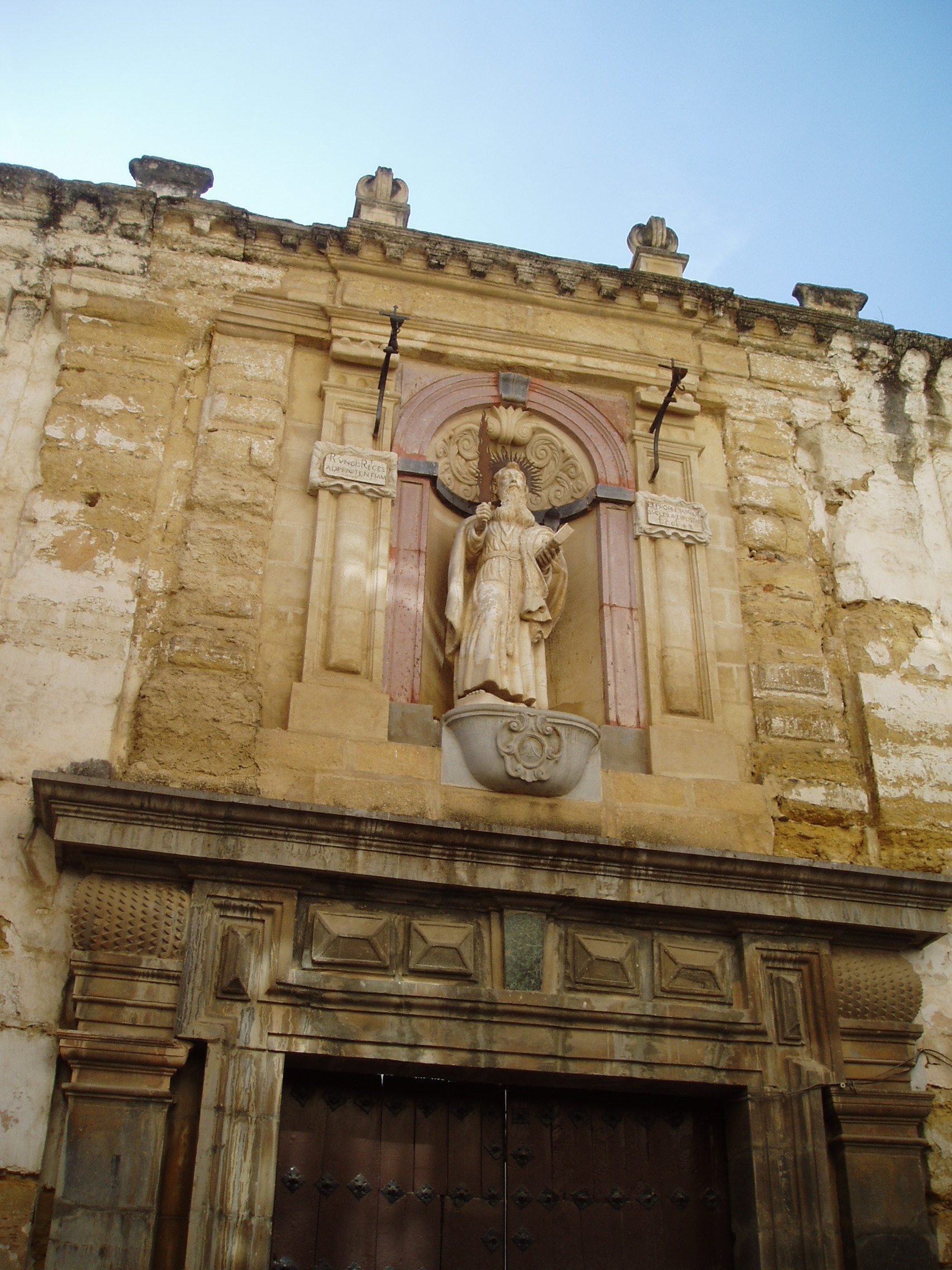 Imagen de San Elías en mármol policromado en el Convento de la Encarnación de Antequera, España.